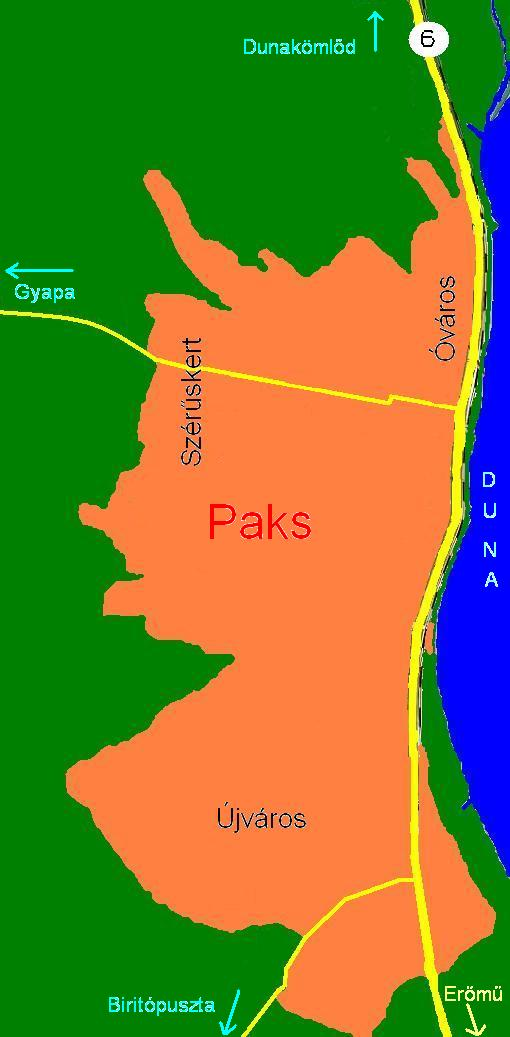 Paks